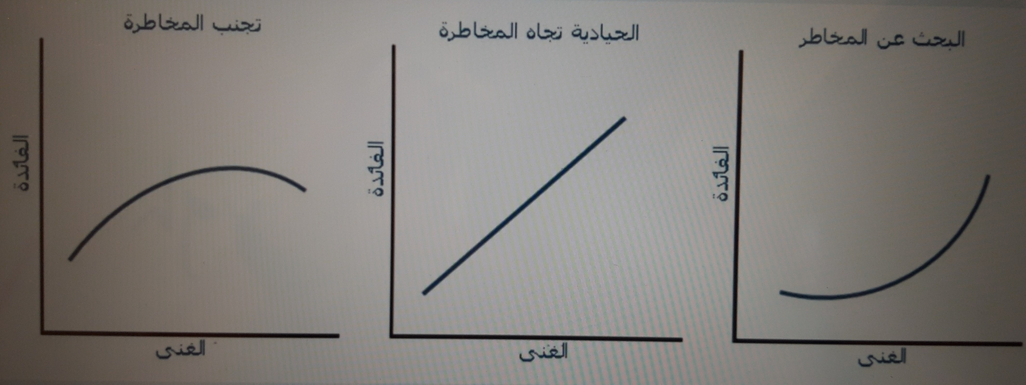 يلحظ هنا اختلاف إنحناء الخطوط مع اختلاف مقاربة المخاطر